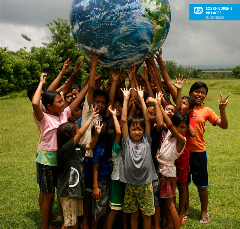 Anak-anak SOS Children's Villages Indonesia